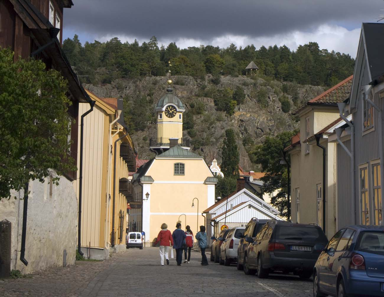 Spre centrul oraşului vechi Söderköping, Suedia.